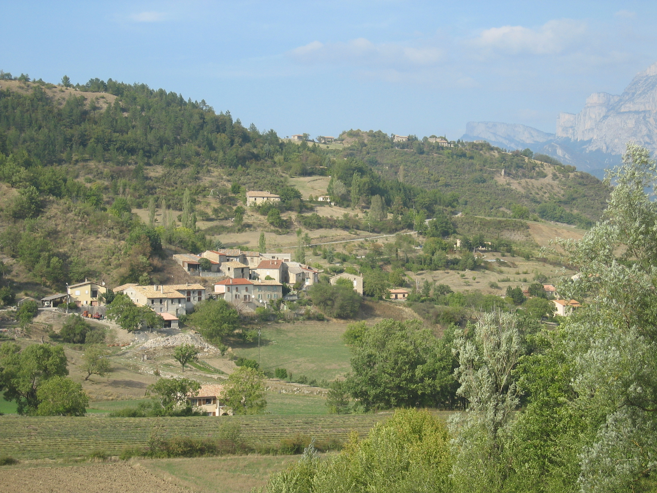 Baties et vieux village